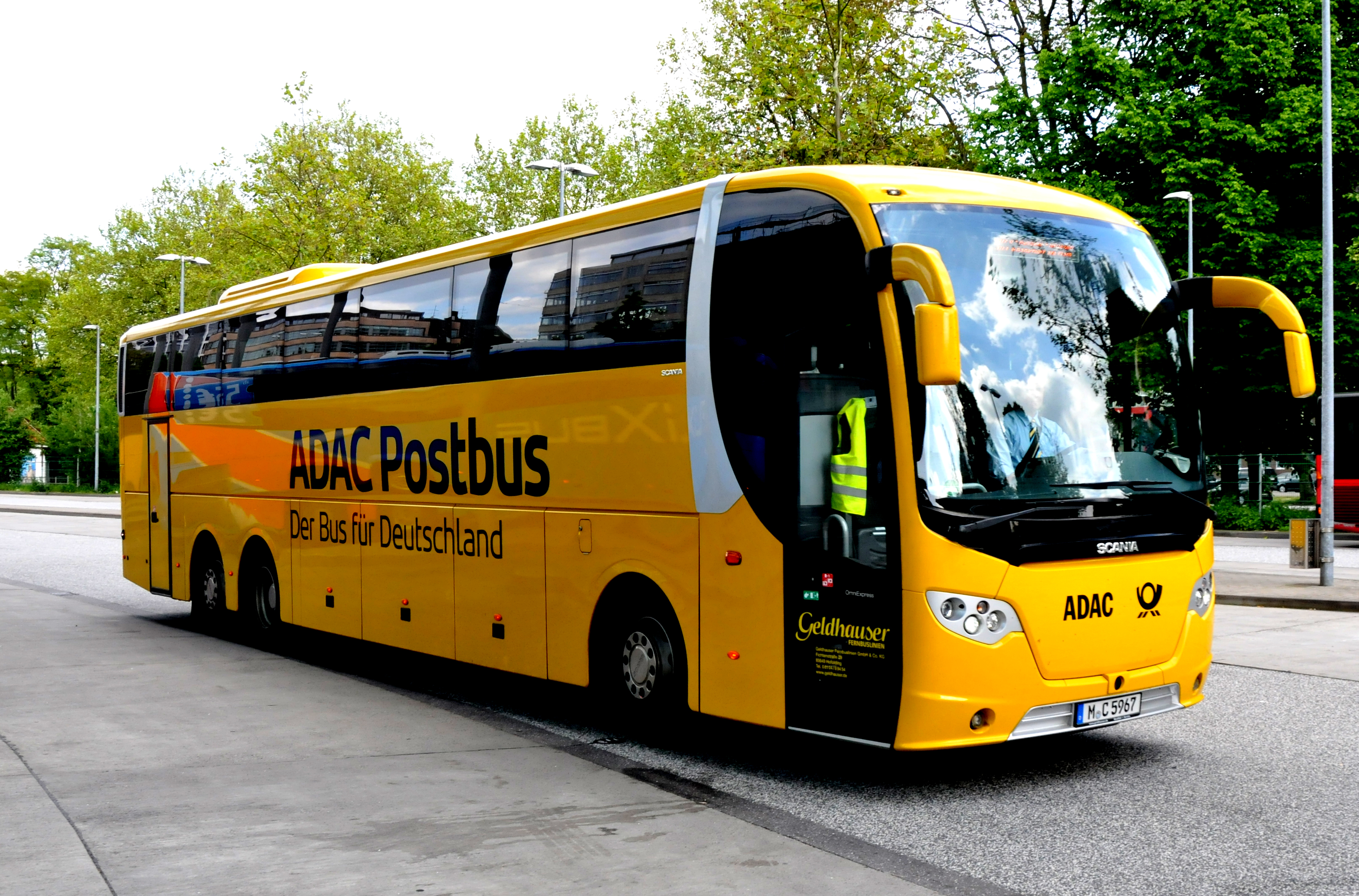 Geldhauser bus van het type Scania OmniExpress bij Buspost ZOB te Hamburg. Dit bedrijf rijdt sinds oktober 2013 in opdracht van ADAC als ADAC-Postbus.